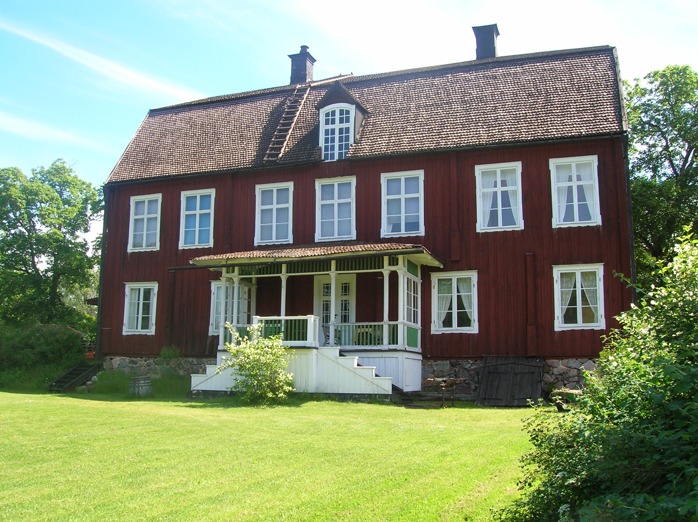 Rodga säteri from the garden, at Norrköpings kommun, Sweden